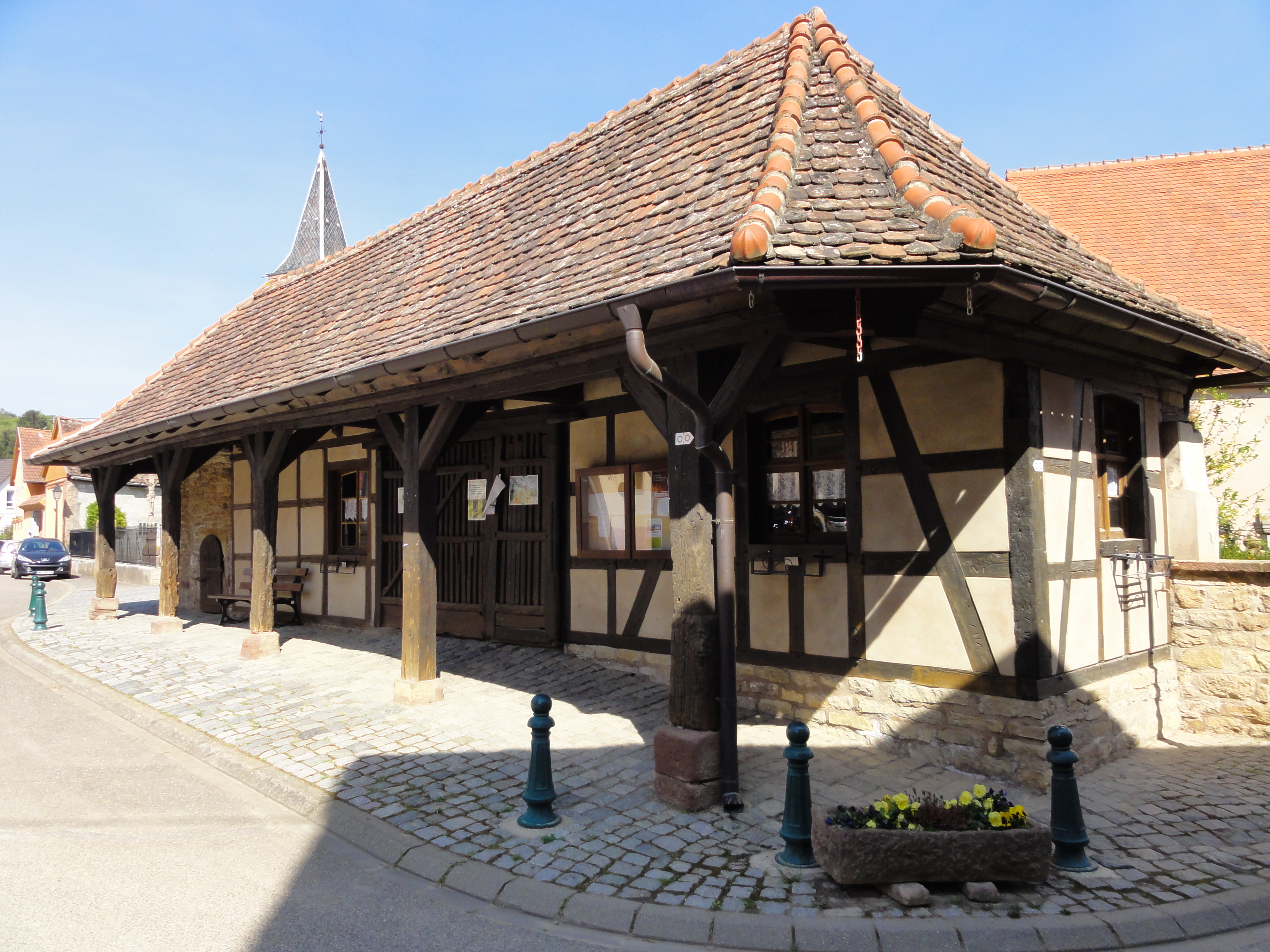 Alsace, Bas-Rhin, Wintzenheim-Kochersberg, Corps de garde (XVIe-XIXe). .